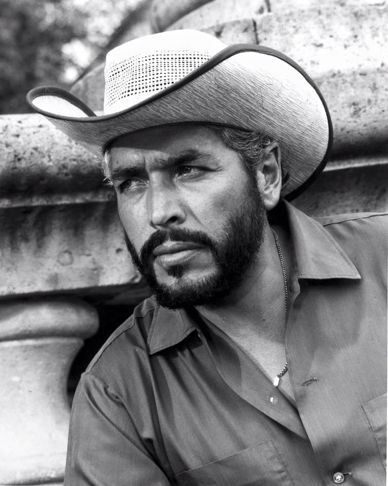 Fotografia tomada en una locación de filmacion